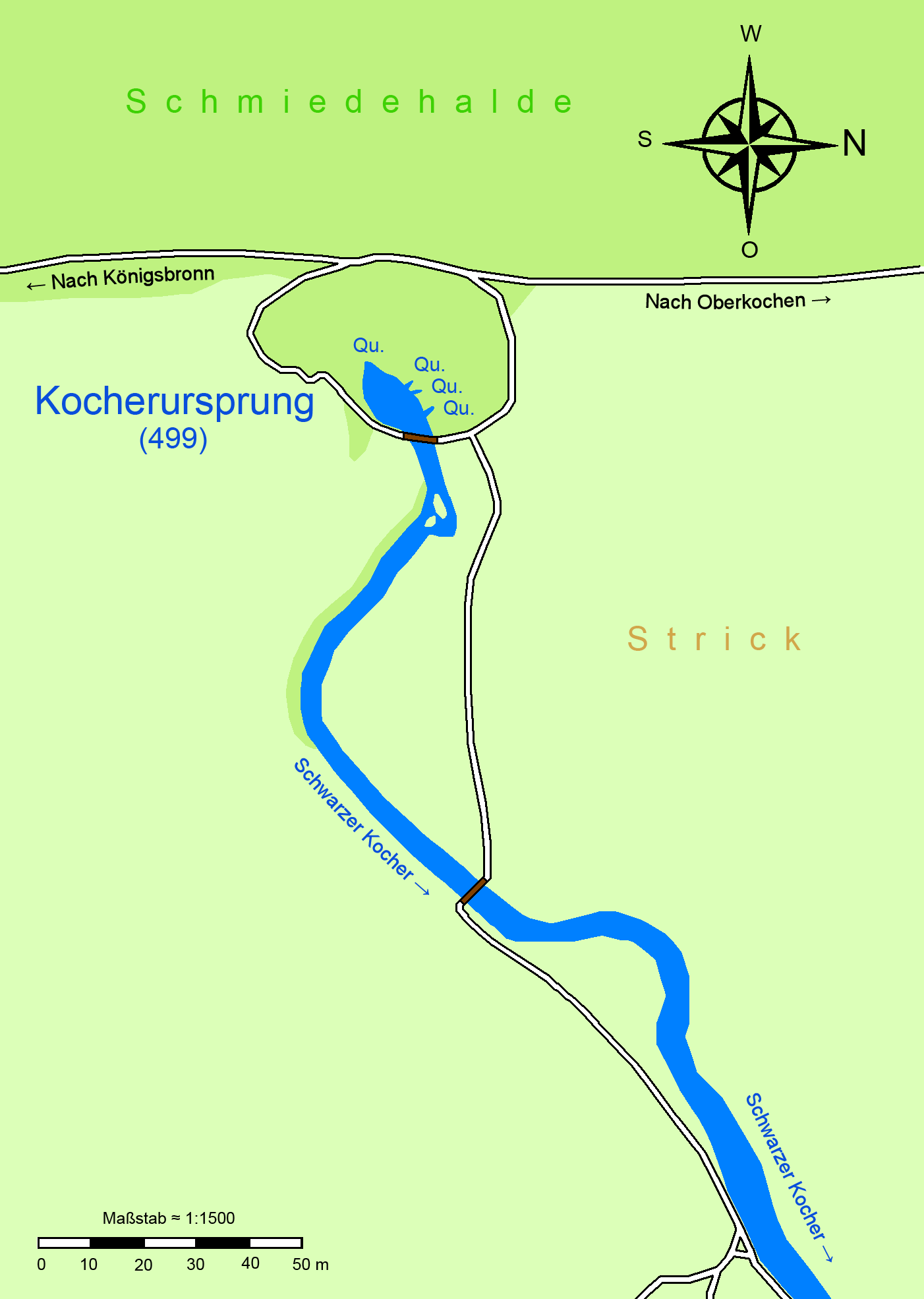 Karte des Kocherursprungs (Schwarzer Kocher) bei Oberkochen, Baden-Württemberg Wald Grünfläche Strick Flurname Brücke Gewässer Qu. Quelle